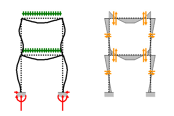 ラーメン構造 02